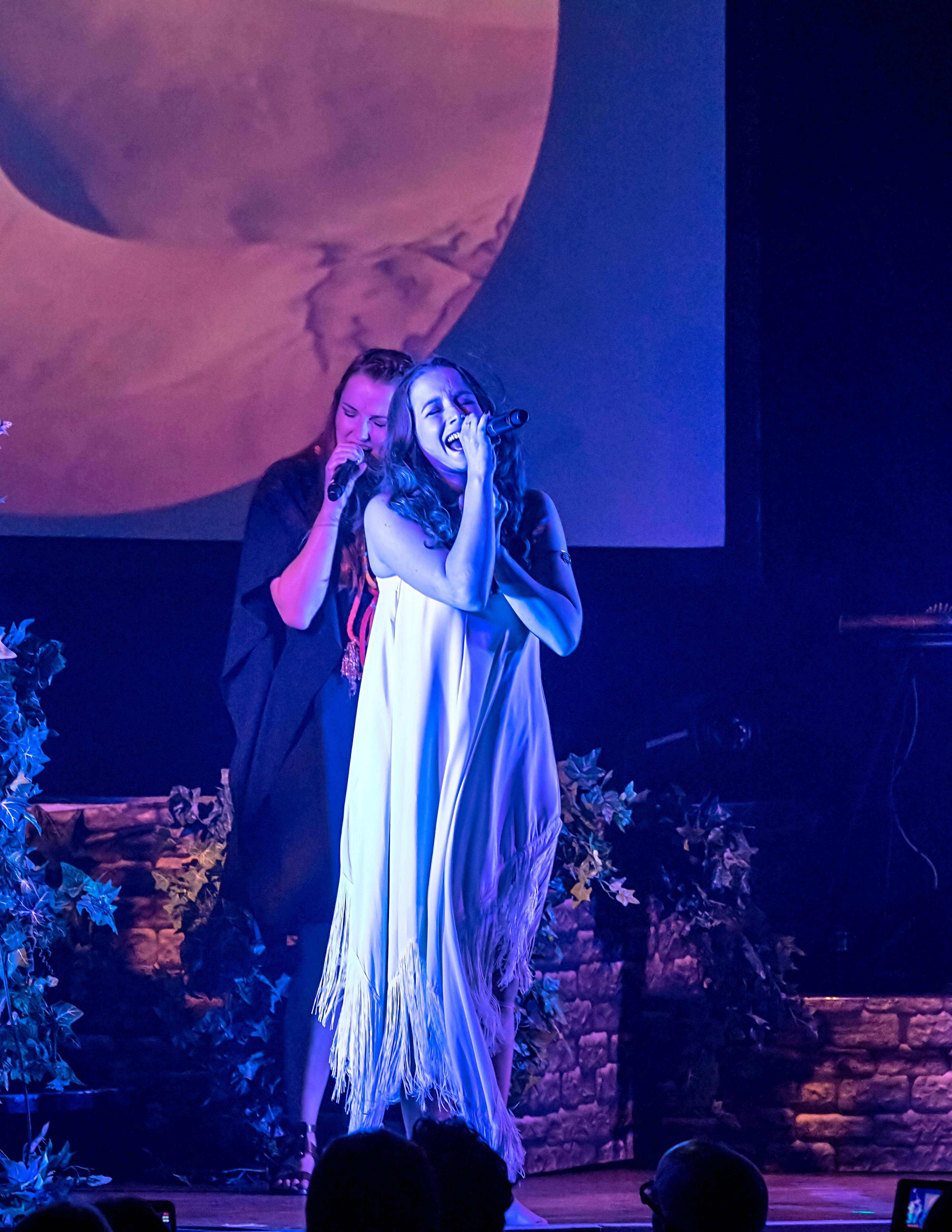 Konzertbilder aus Freiburg im Breisgau Das Konzert der Gruppe Oonagh am 30.04.2015 im Freiburger Paulussaal